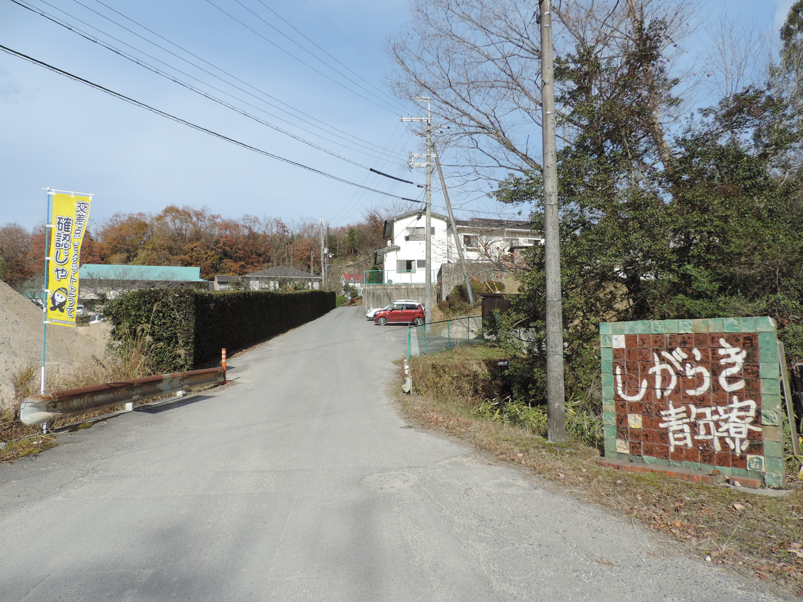 信楽青年寮（滋賀県甲賀市）。2017年撮影